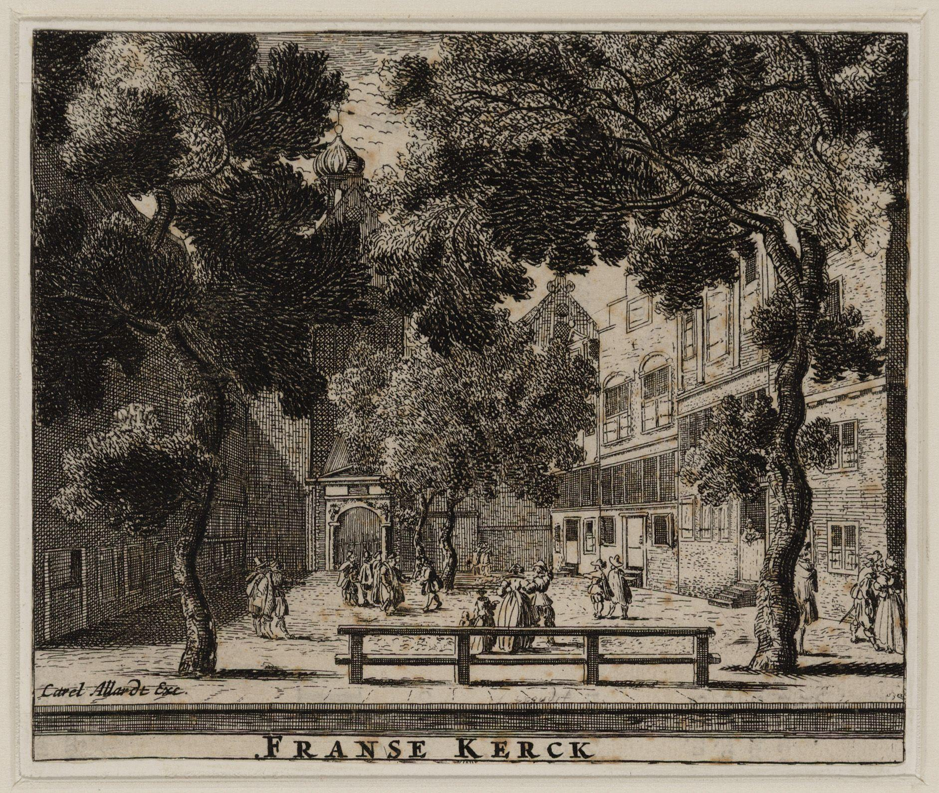 Beschrijving Franse Kerck Oudezijds Achterburgwal 155-167, de Franse (of Waalse) Kerk aan het Walenplein. Techniek: ets Documenttype prent Vervaardiger Allard, Carel (1648-1709) Collectie Collectie Stadsarchief Amsterdam: tekeningen en prenten Datering 1675 ca. t/m 1708 ca. Geografische naam Walenpleintje Oudezijds Achterburgwal Inventarissen Afbeeldingsbestand 010097003019